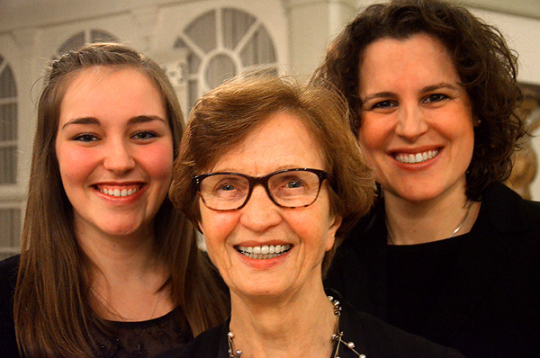 Nach dem Chorkonzert „Chormusik von Bach bis Pärt“ des Mädchenchors Hannover mit dem Arte-Ensemble auf Einladung des Klosters Walsrode in der Stadtkirche St. Johannis-der-Täufer am 5. März 2017 stellten sich drei der Protagonisten den Fotografen (von links): Die mehrfach ausgezeichnete Sängerin Katharina Held, die Chorleiterin und Dirigentin Gudrun Schröfel sowie die mehrfach diplomierte Mezzosopranistin Mareike Morr ...